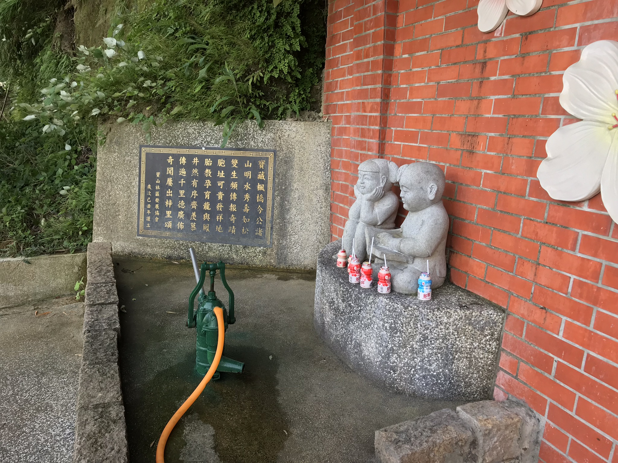 中文（台灣）: 寶山雙胞胎井